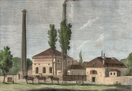 Représentation de la Pompe à feu de Chaillot, avec ses deux pompes et cheminées en 1881. Gravure sur bois, dessinée par Forgeot, gravée par Crepaux. Aquarellée à la main. Date : 1881